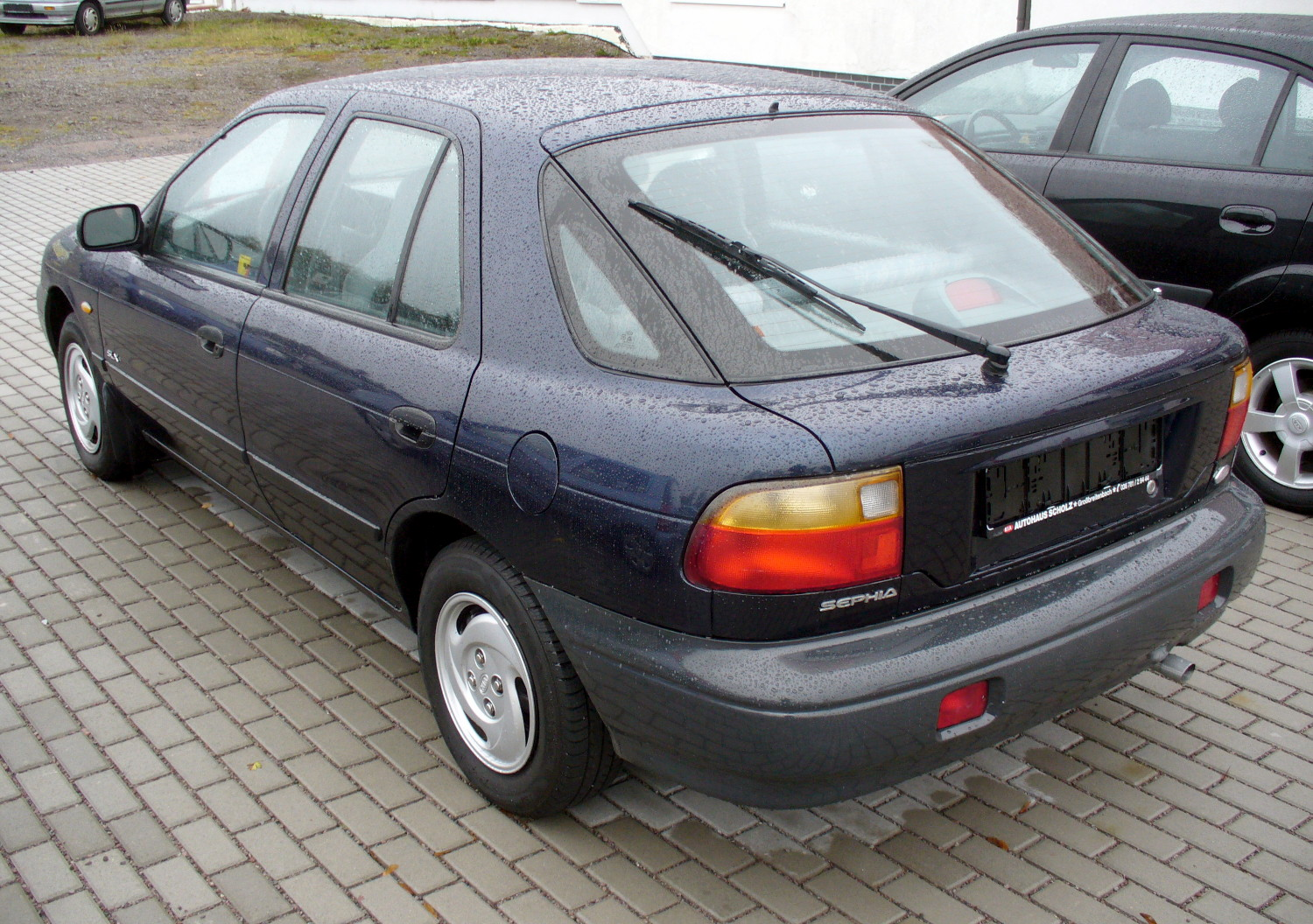 Kia Sephia